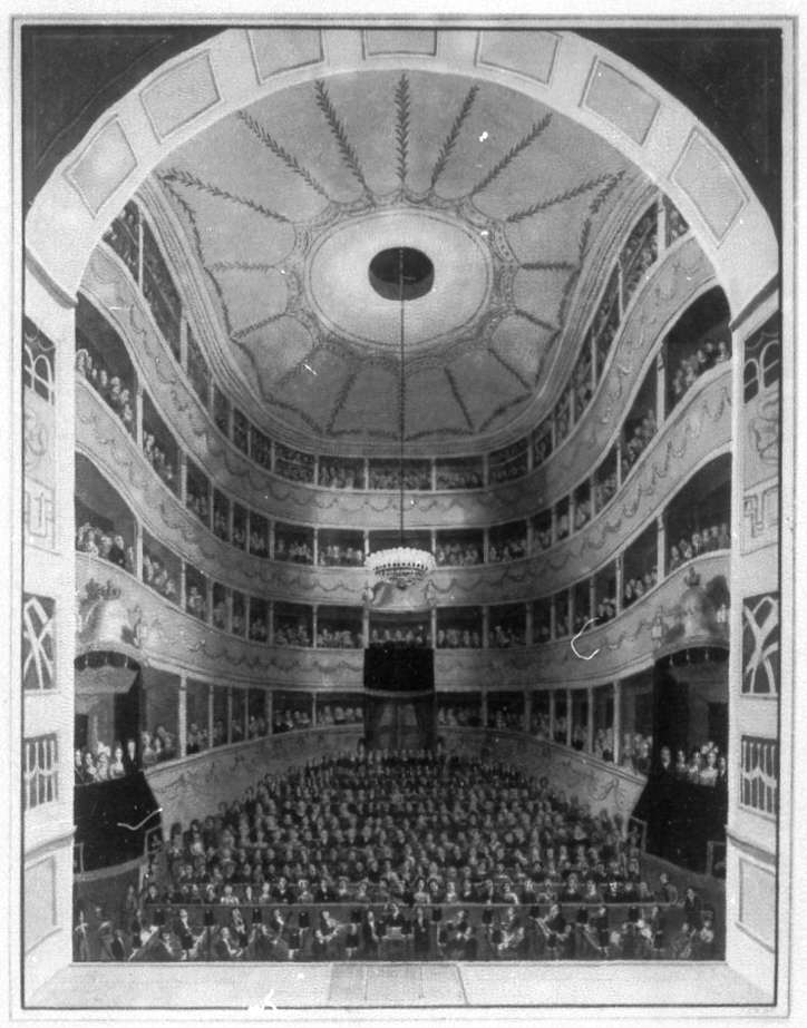 Dresden, Theaterplatz, Morettisches Theater: Inneres, Blick von der Bühne in den Zuschauerraum, 1841, Dresden, Staatliche Kunstsammlungen Dresden, Kupferstichkabinett